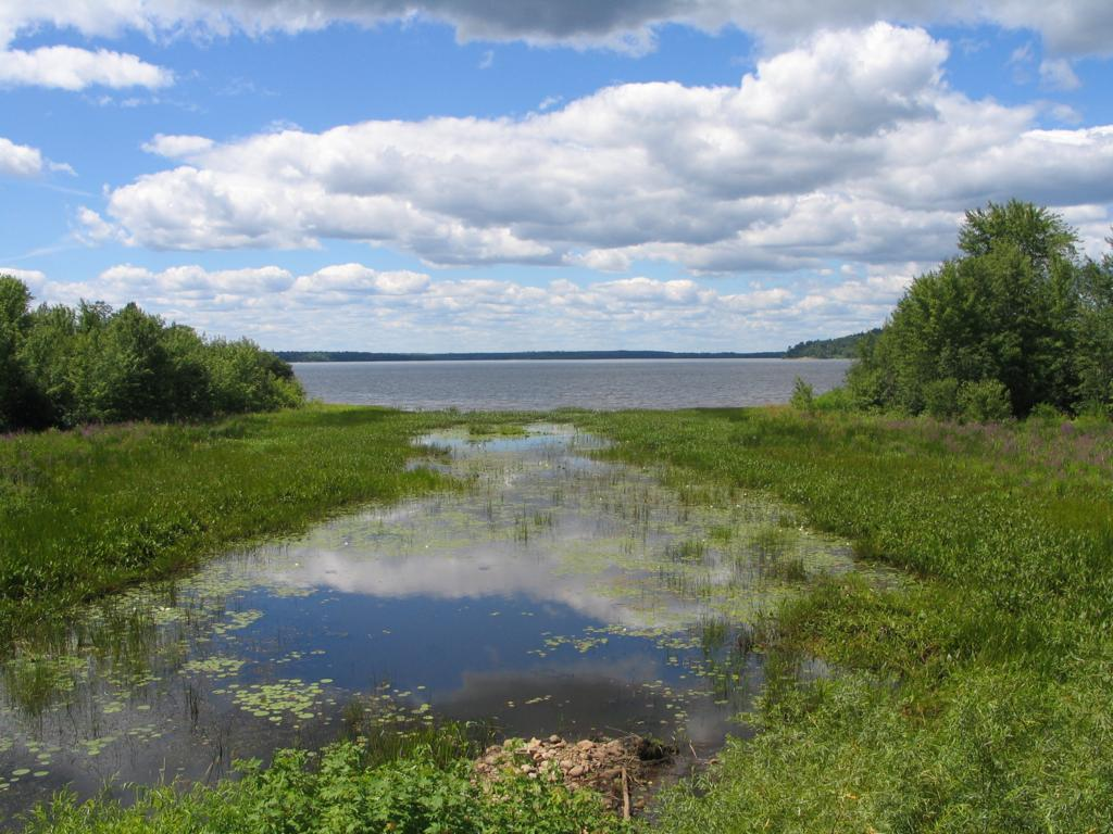 Vers l'ouest sur le lac Coulonge, Québec, Canada